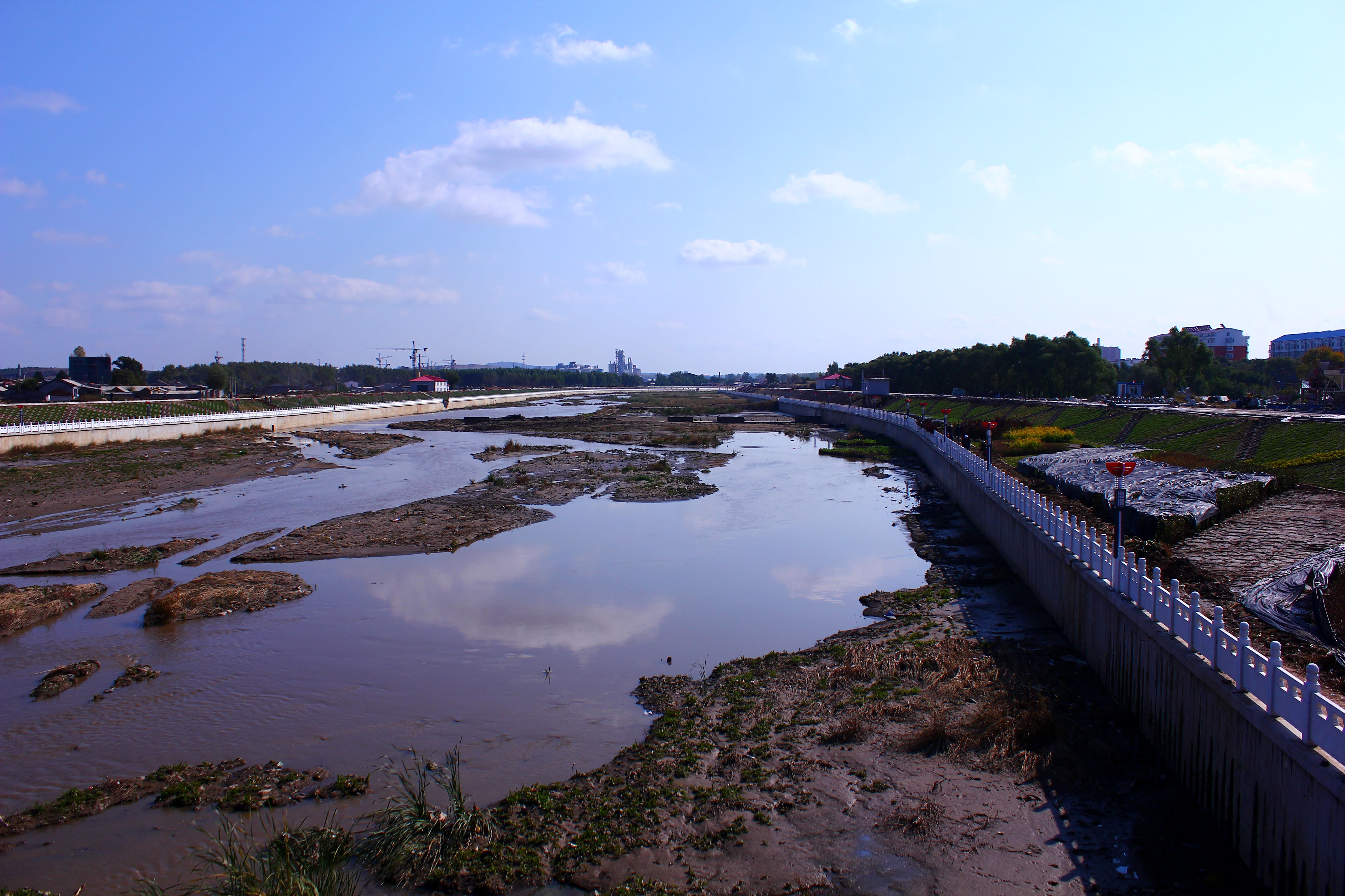 2012年10月4日伊通镇北大桥附近的伊通河